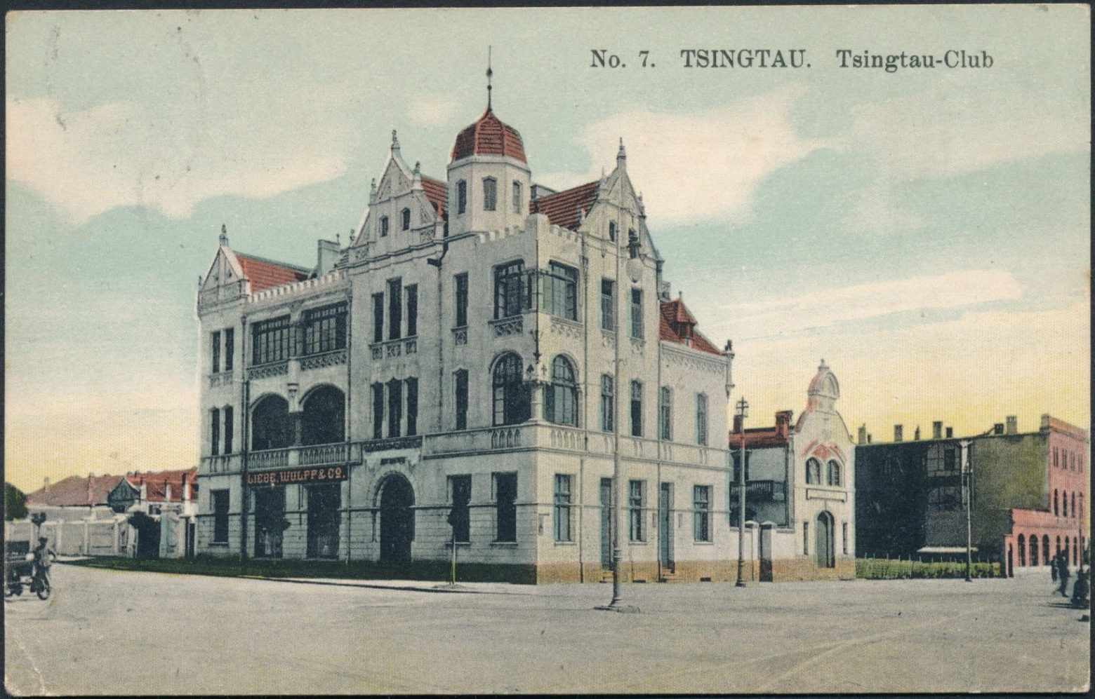 青岛博德维希商业大楼